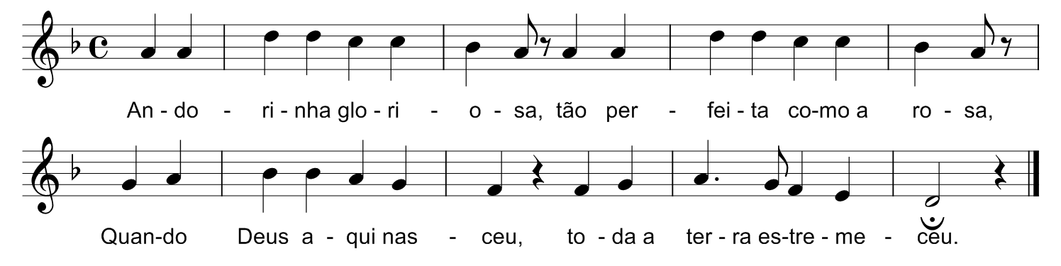 Andorinha gloriosa, música tradicional portuguesa coligida por Pedro Fernandes Tomás na Figueira da Foz e publicada em 1913 em Velhas Canções e Romances Populares Portugueses. (Ligeiramente adaptada).